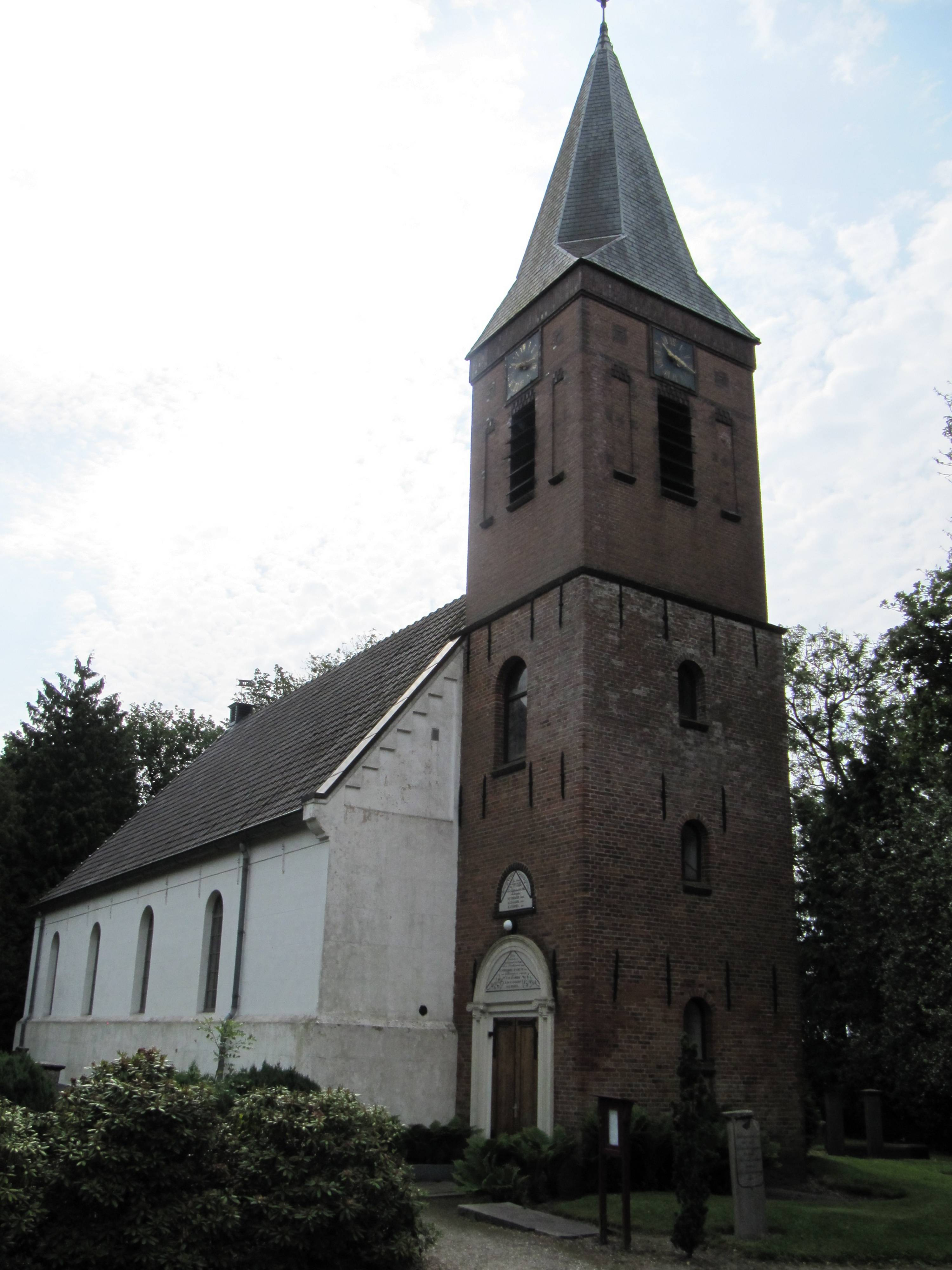 Even buiten de dorpskom gelegen kerkgebouw uit 1717 met toren waarvan het benedendeel uit 1841 en het bovendeel uit 1925 stamt.